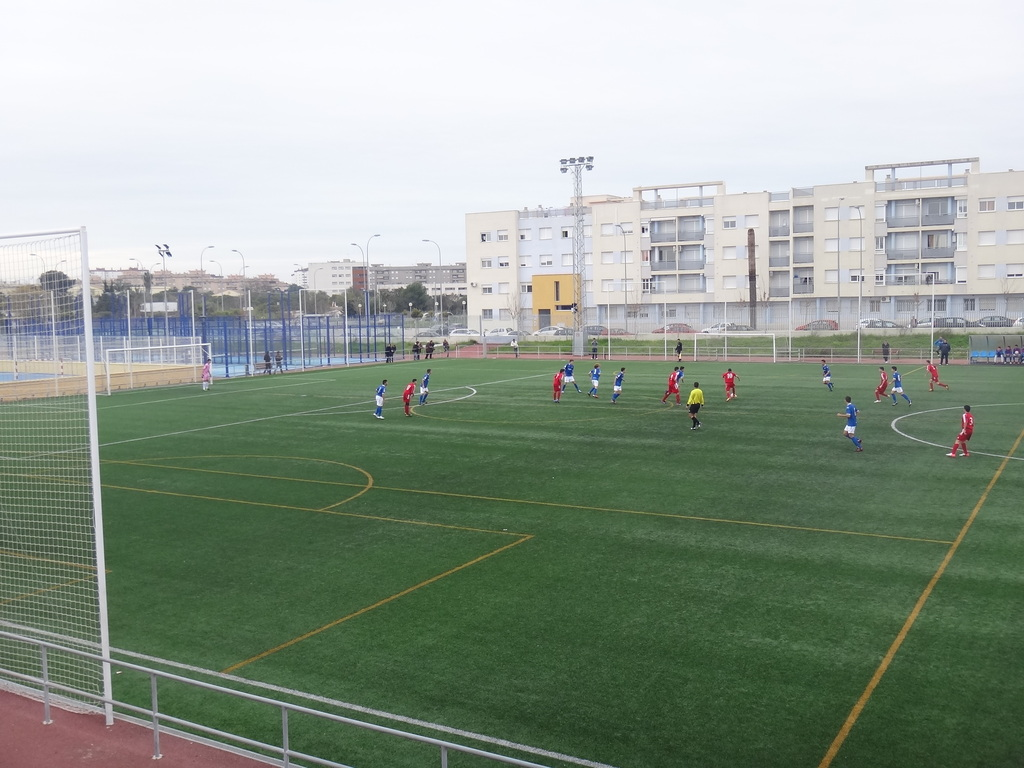 Partido de fútbol entre categorías inferiores (cadetes) del Xerez y Utrera. Complejo Deportivo La Granja, Jerez de la Frontera (Andalucía, España)